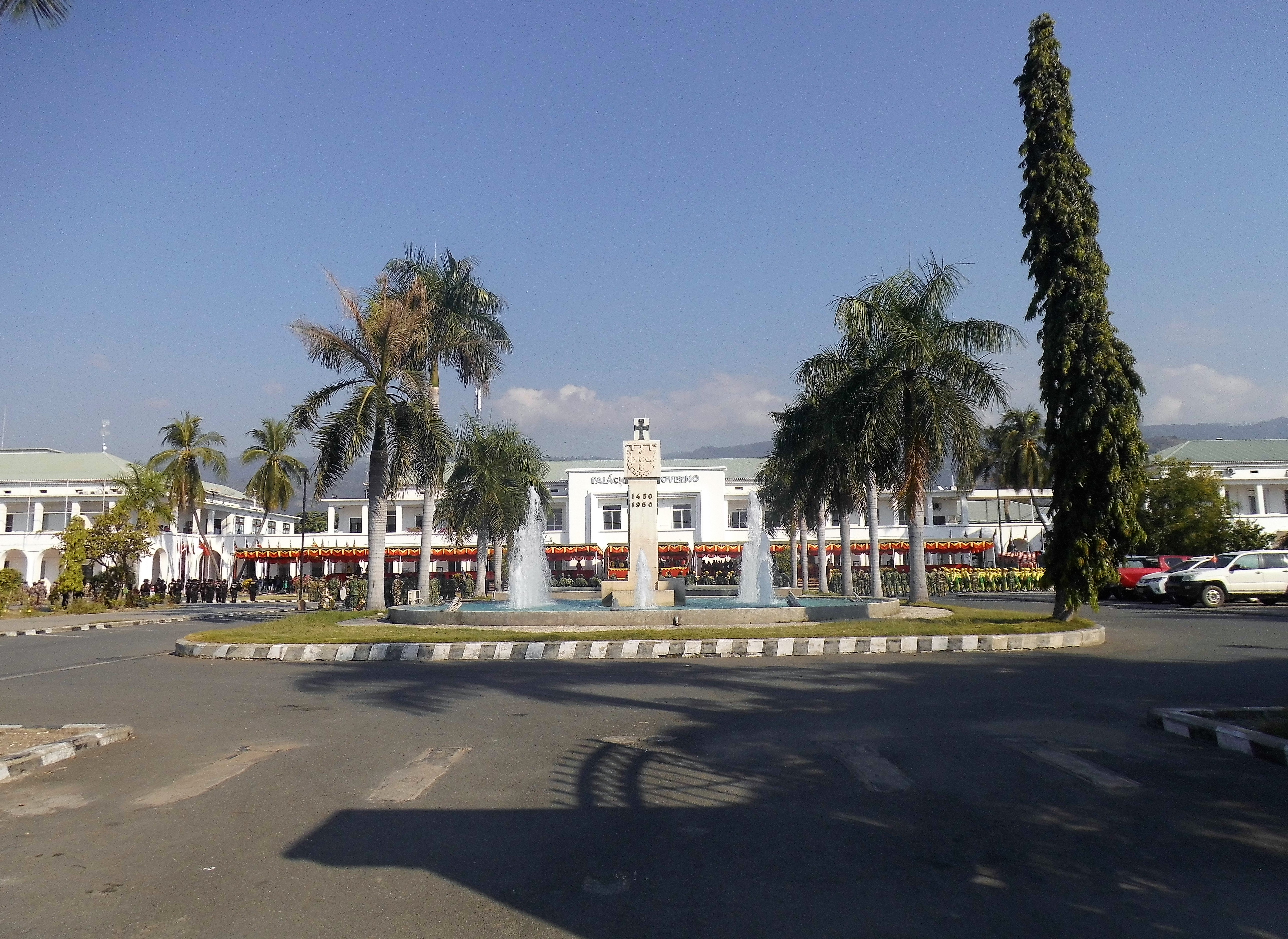 Regierungspalast